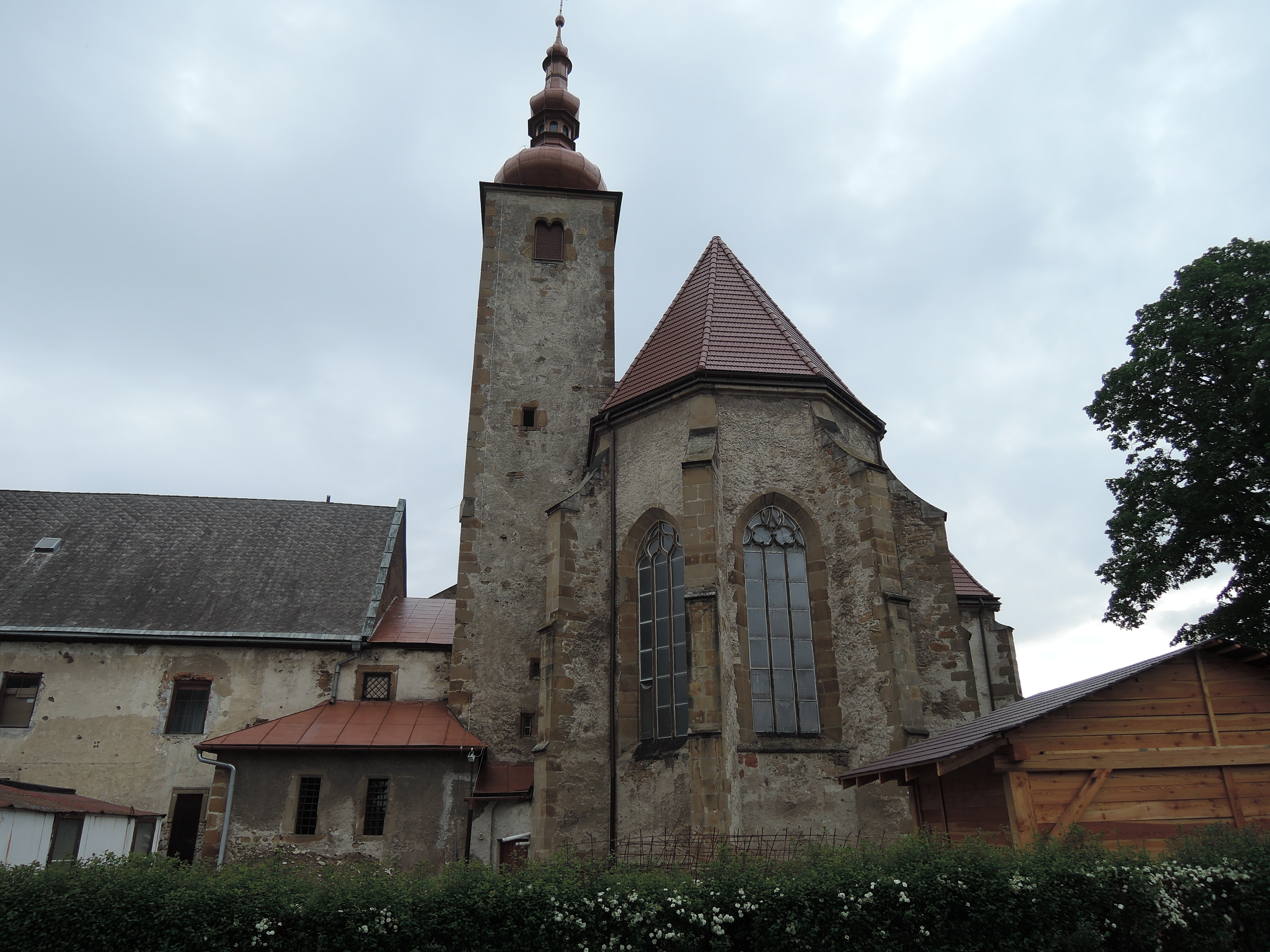 jan blana